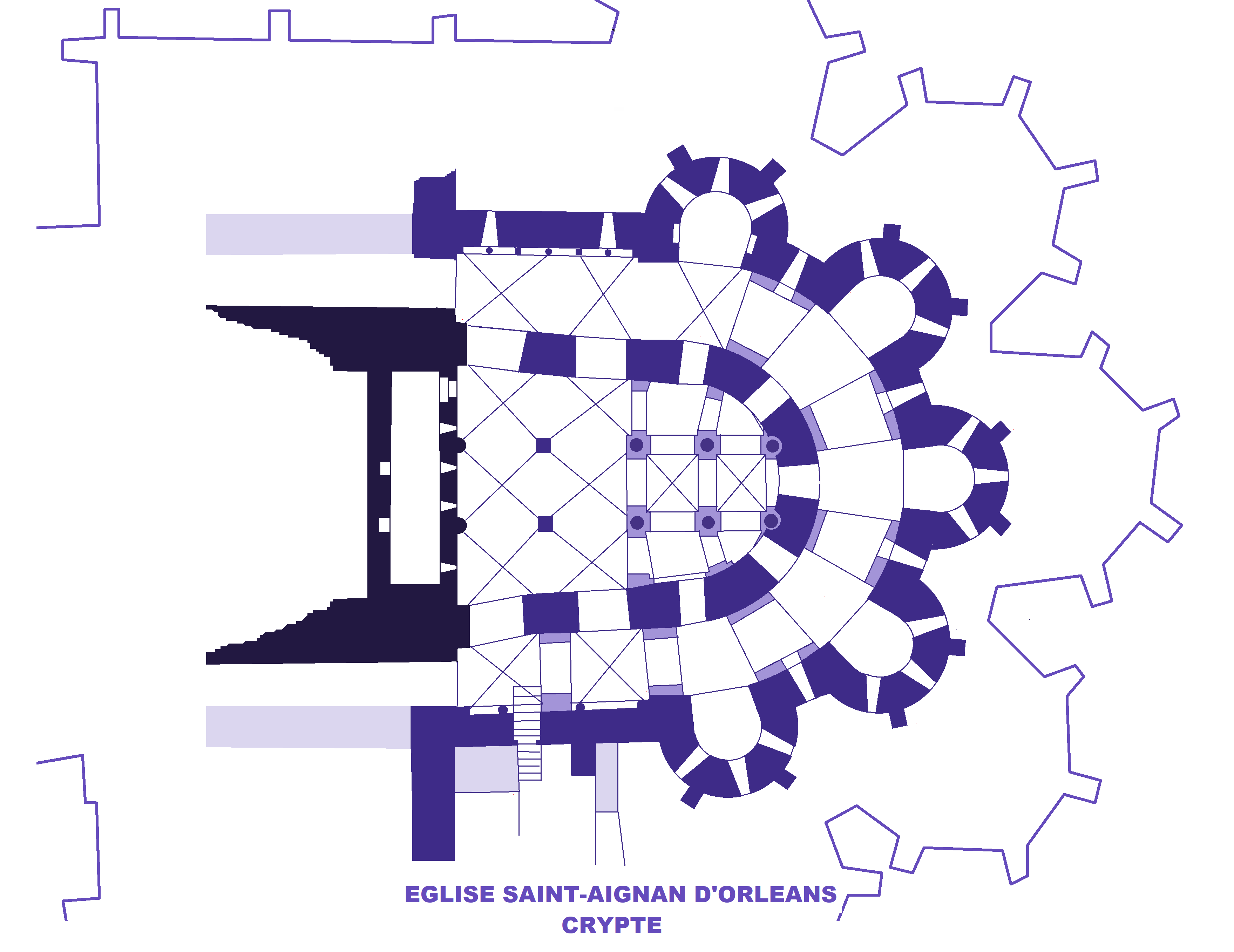 Eglise Saint-Aignan d'Orléans, plan de la crypte